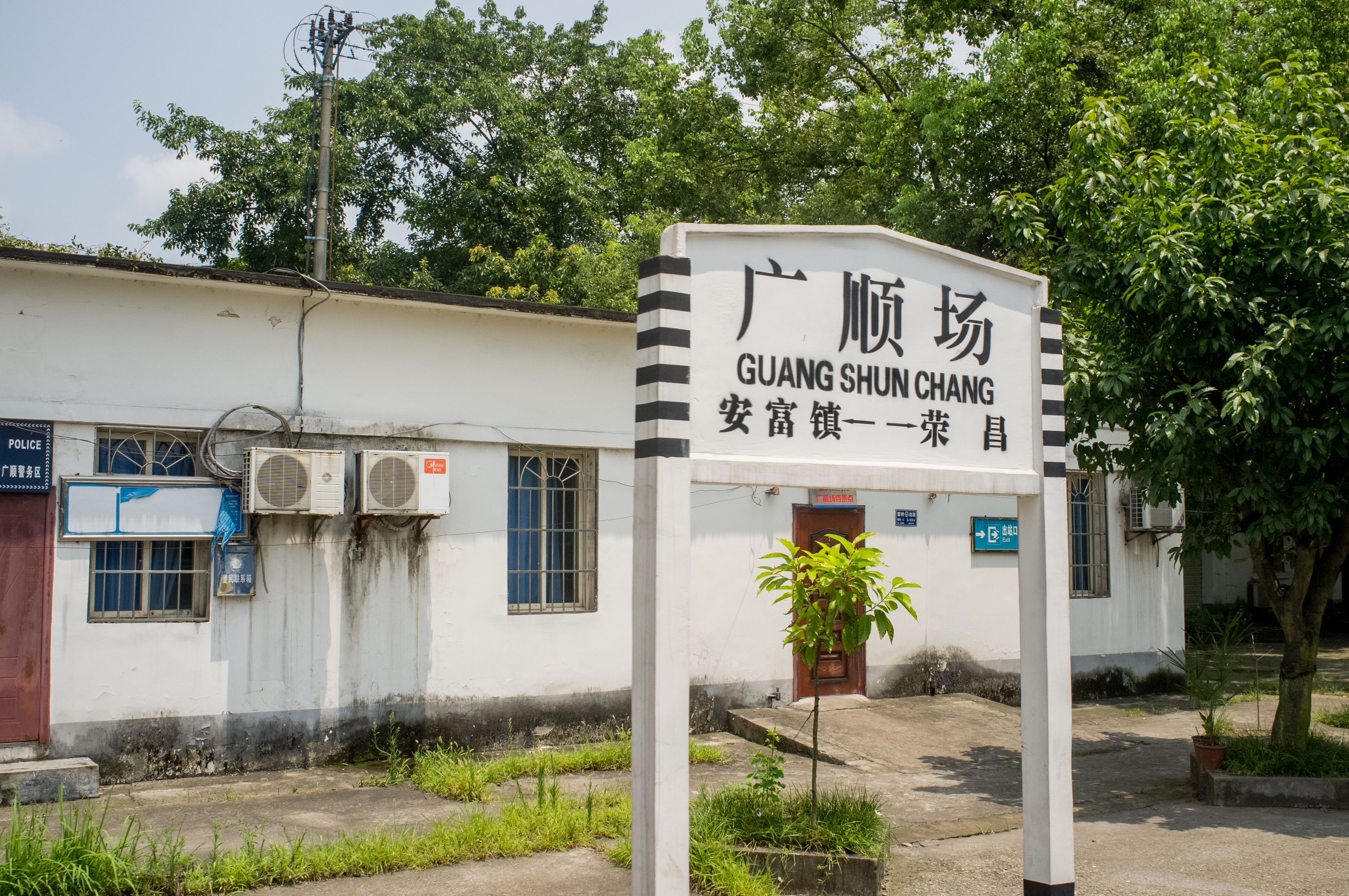 中文（中国大陆）: 成渝铁路广顺场站